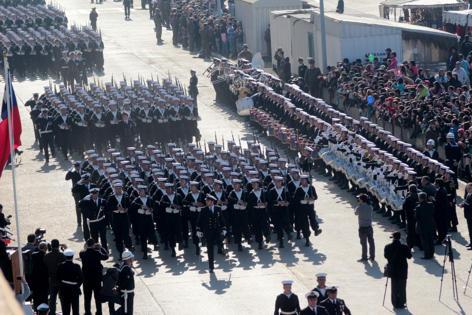 Talcahueno. Masivo homenaje a las Glorias de Chile se rindió la mañana del 21 de mayo de 2013.